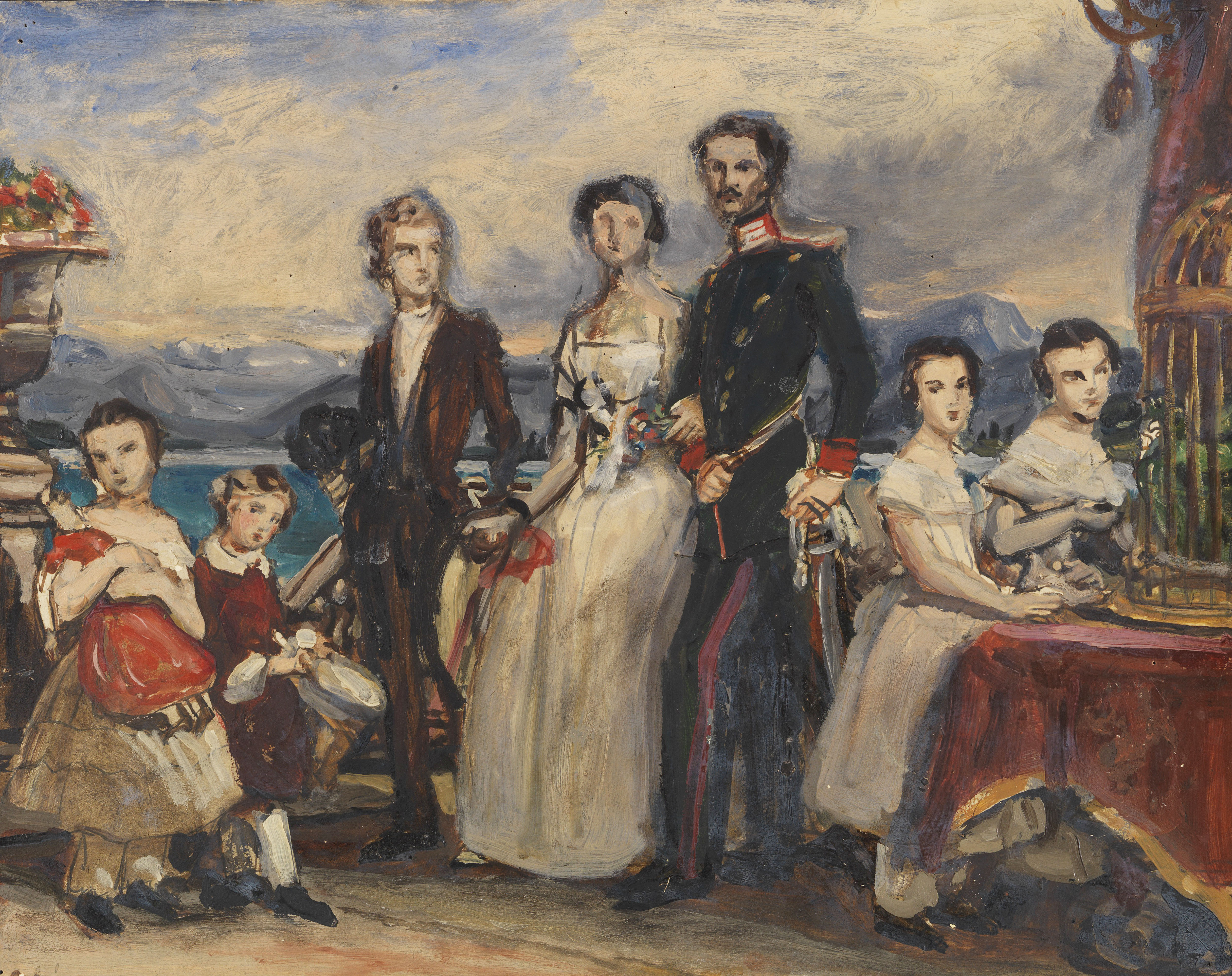 Studie zu dem Gemälde "Die Geschwister der Kaiserin Elisabeth von Österreich". Öl auf festem Papier. Verso in Tinte signiert, datiert und bezeichnet "Prinz Louis/ Helene/ Pr. Karl Theodor/ Marie/ Mathilde/ Sophie/ Pr. Max/ Familie des Herzog 'Max' in Bayern, gemalt von J. Stieler 1854; Bild im Schlosse Laxenburg bei Wien." sowie mit Nummerierung in Bleistift. 33,7 x 42 cm